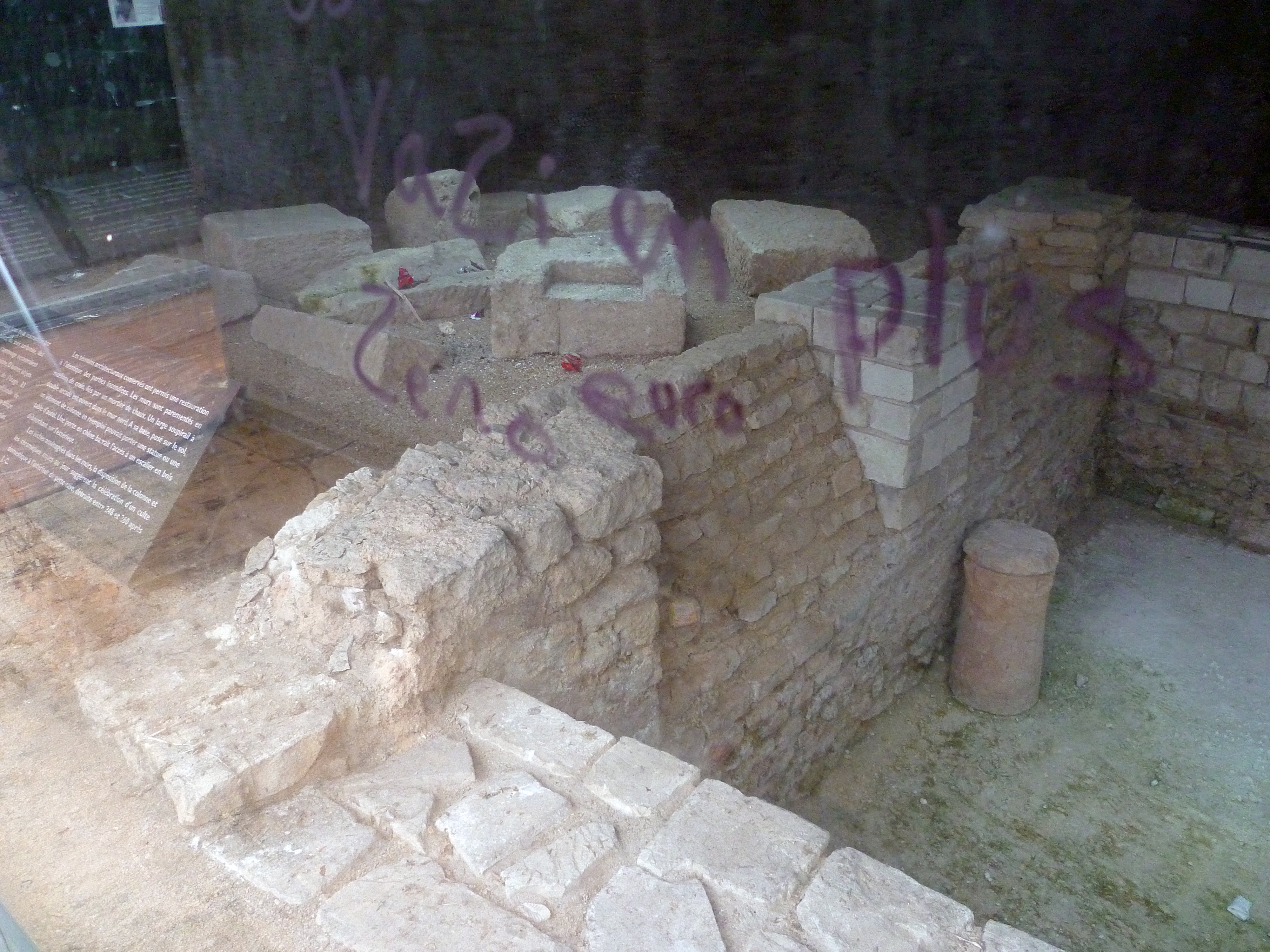 Le site gallo-romain de la porte de Chaillouet à Troyes (Aube, France).